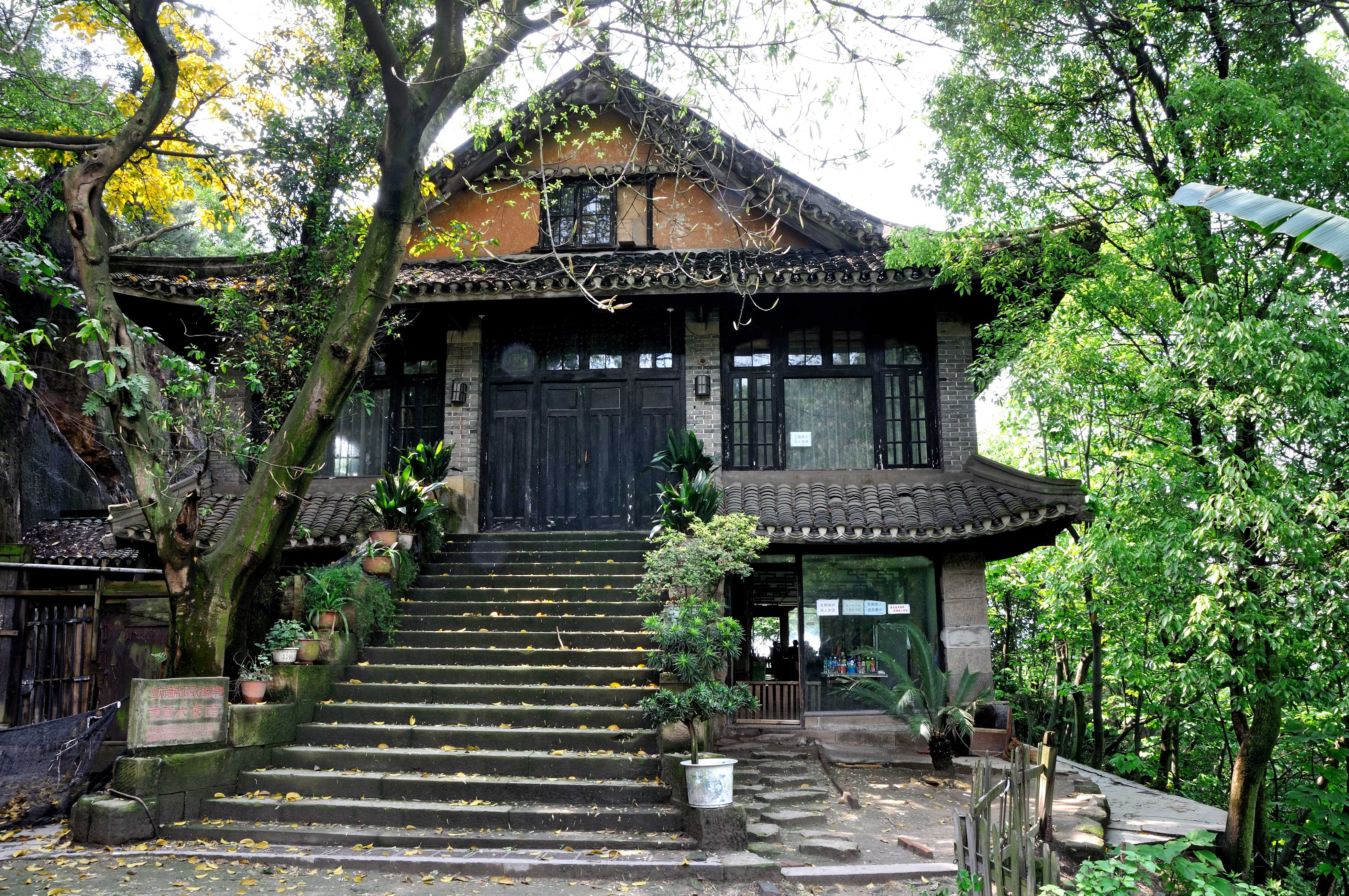 重庆德国大使馆旧址。